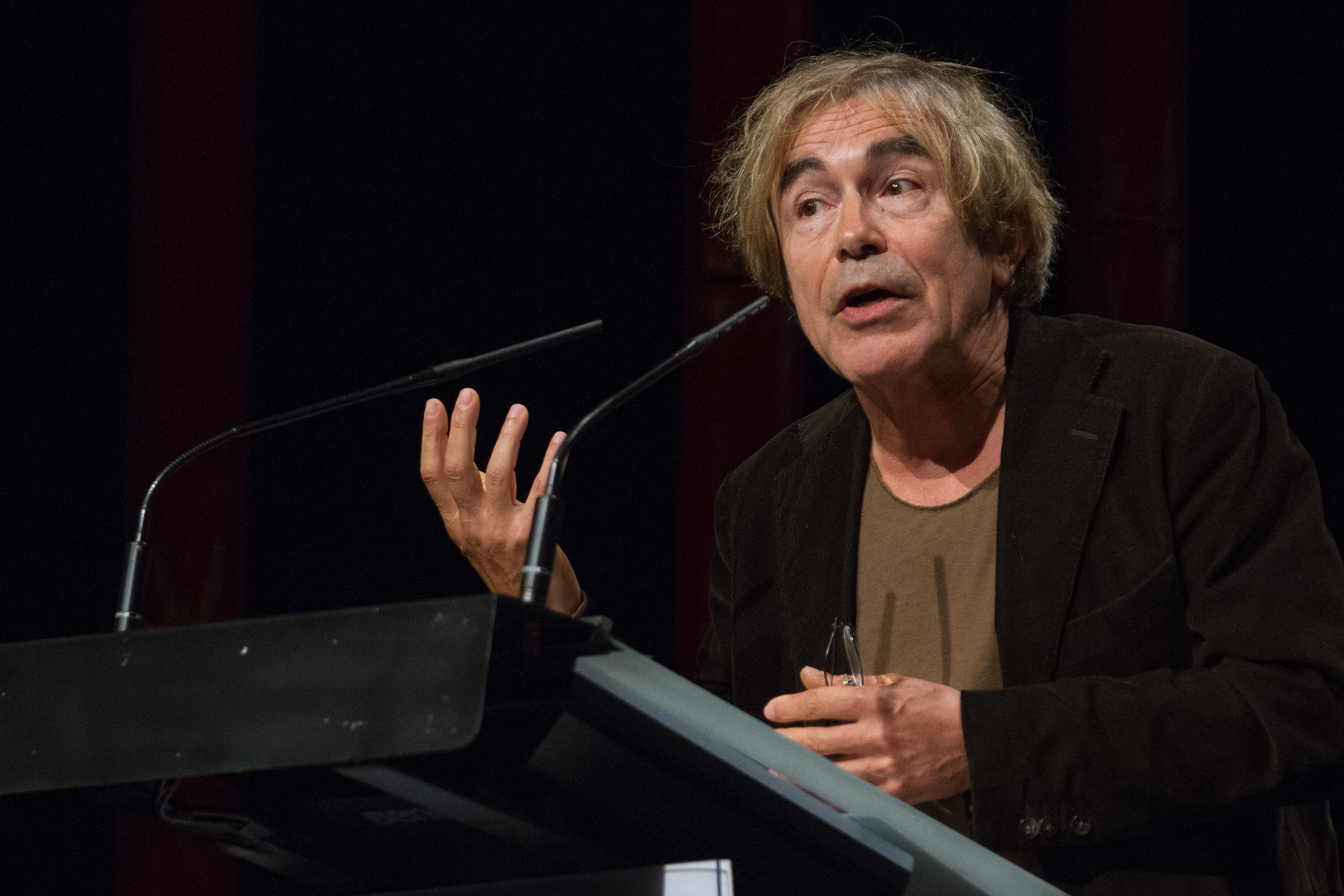 François Jullien président du FIG 2013